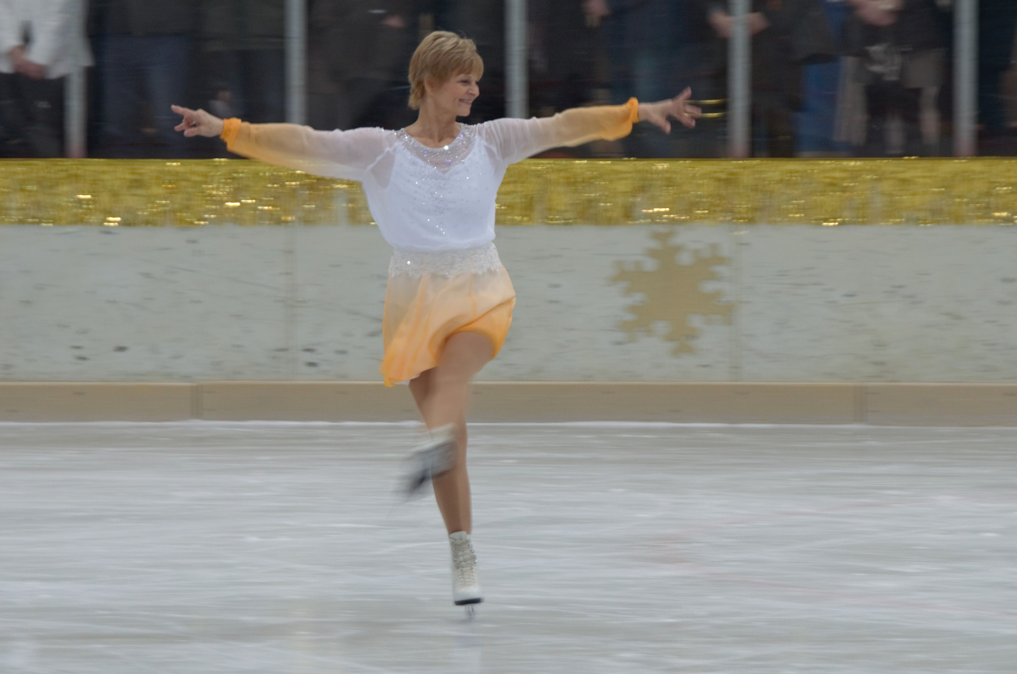 Berlin Sportforum Hohenschönhausen